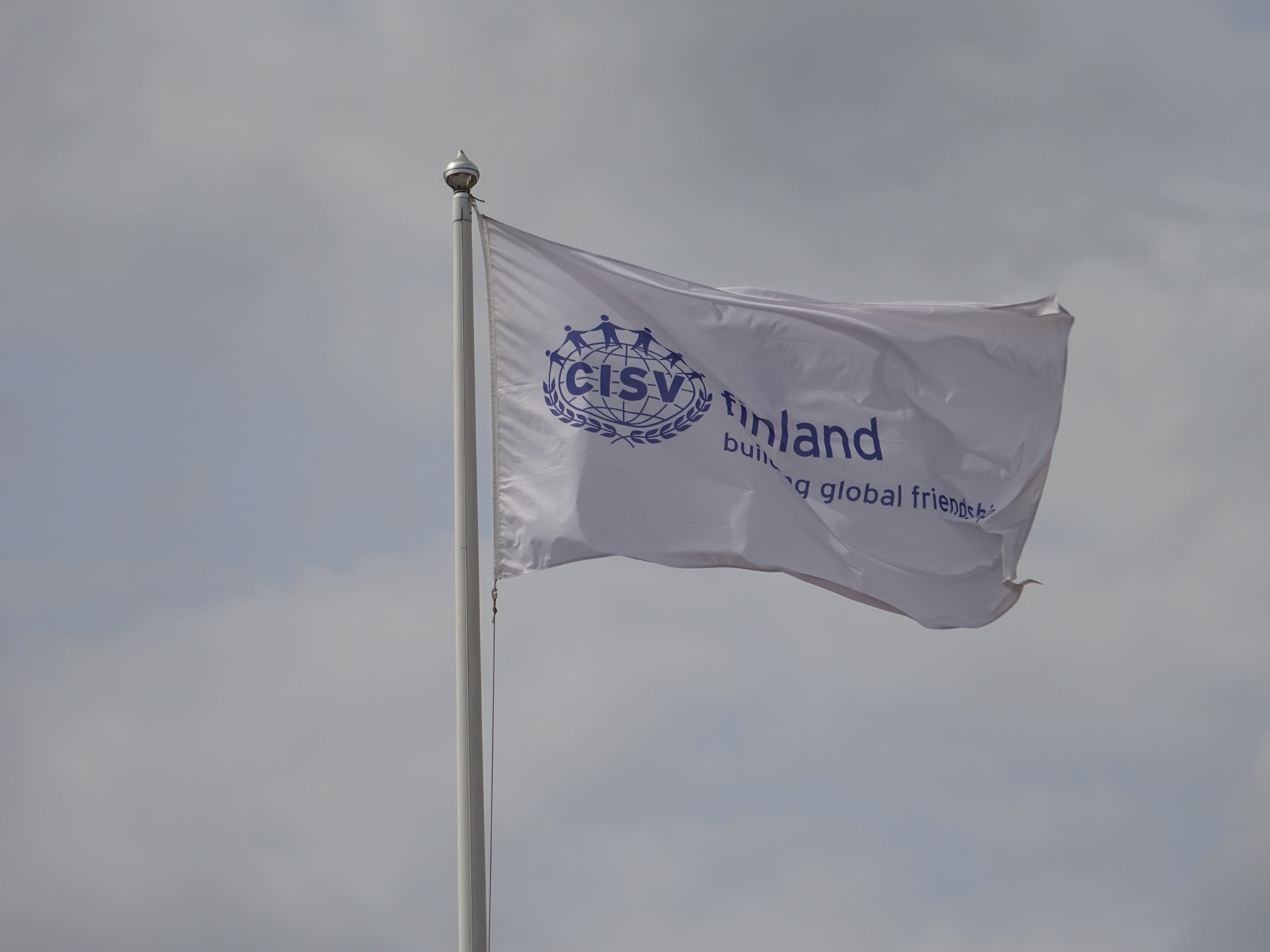 CISV-lippu salkoon nostettuna CISV Finlandin ensimmäisellä kansallisella leirillä Seinäjoella kesäkuussa 2018.